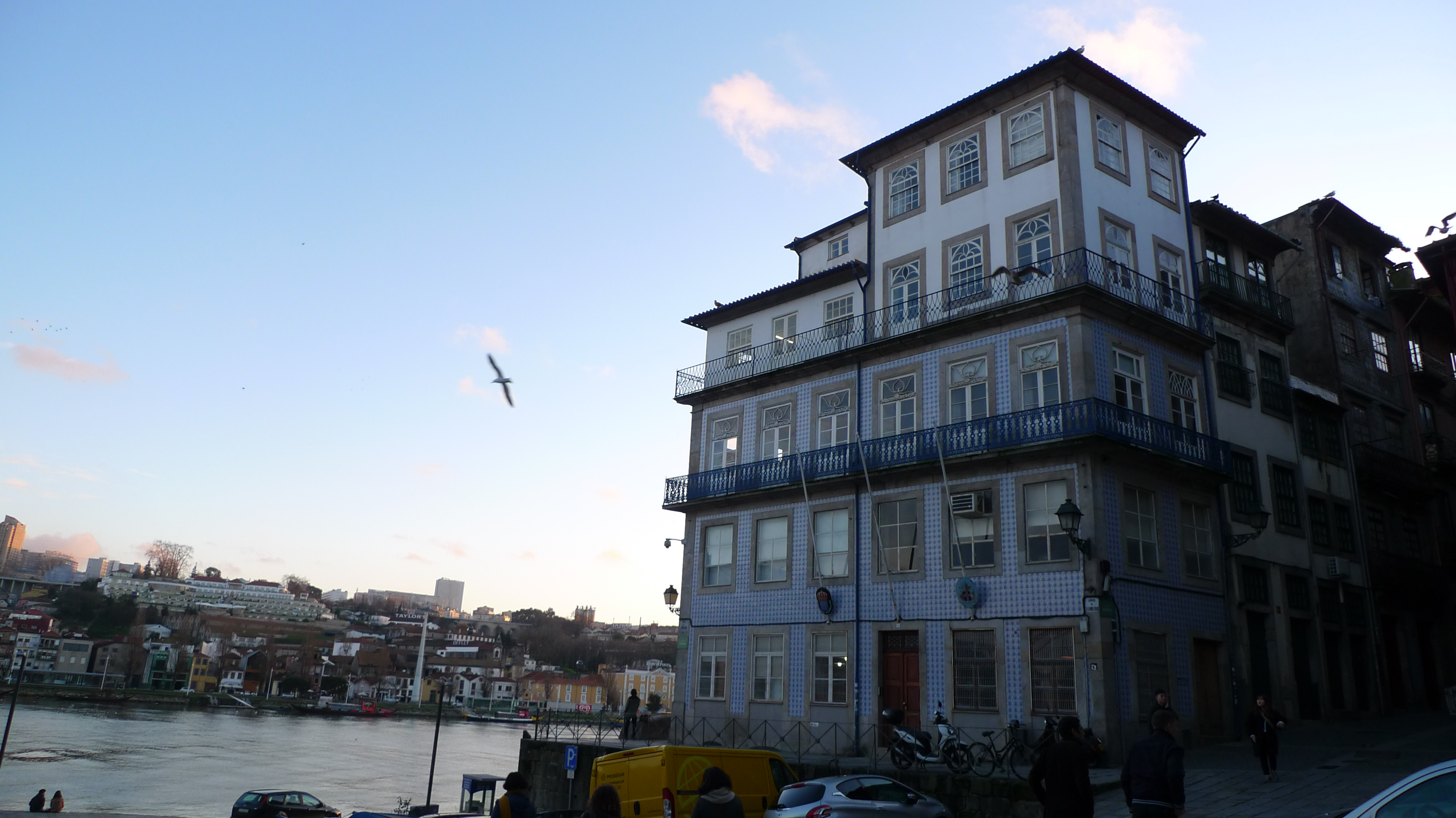 L1180051